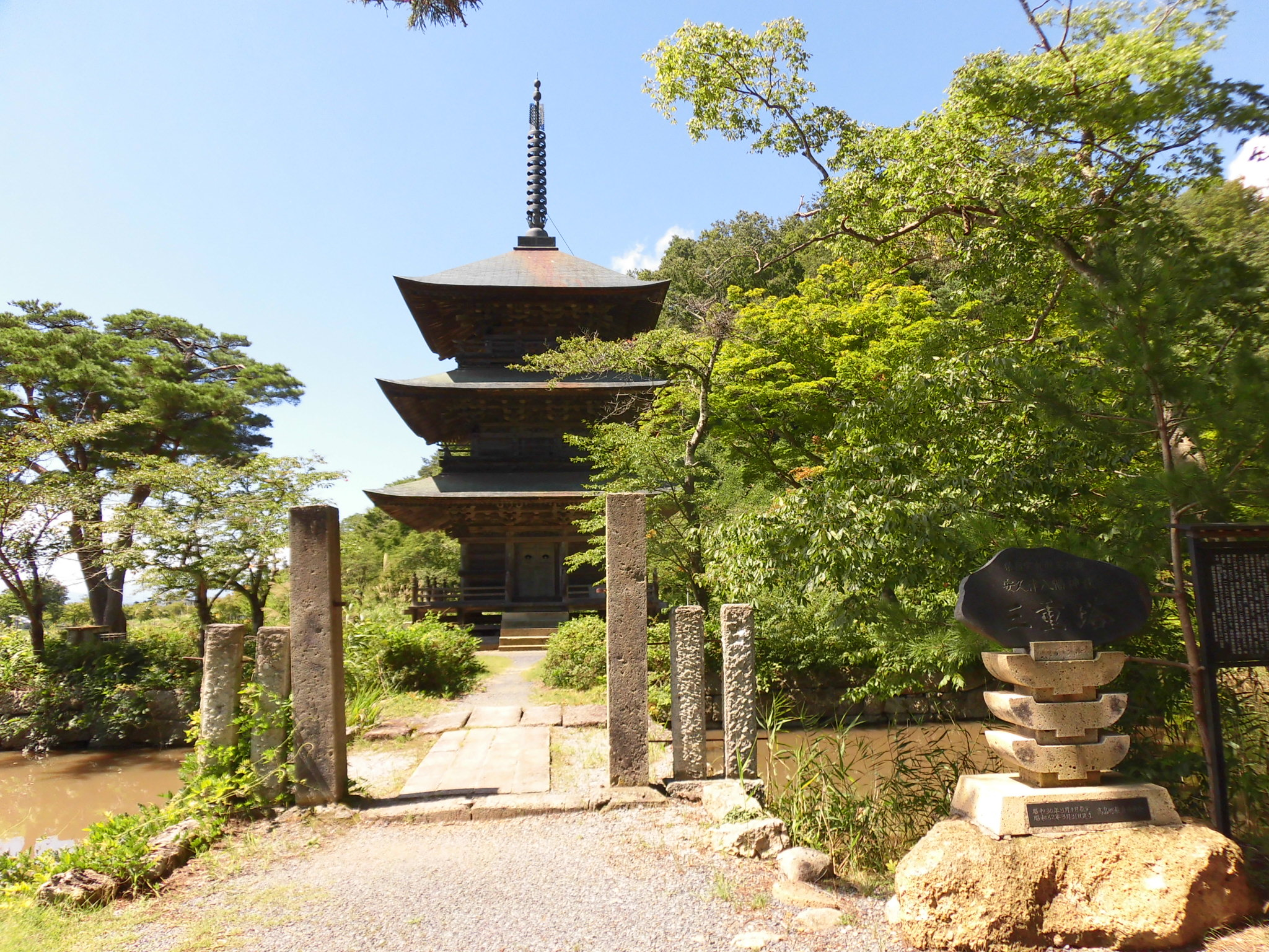 安久津八幡神社（安久津八幡宮）三重塔。山形県東置賜郡高畠町に所在。 現在の塔は寛政9年（1797年）に再建された。 昭和30年（1955年）8月1日に山形県指定有形文化財に指定。置賜地区唯一の層塔。